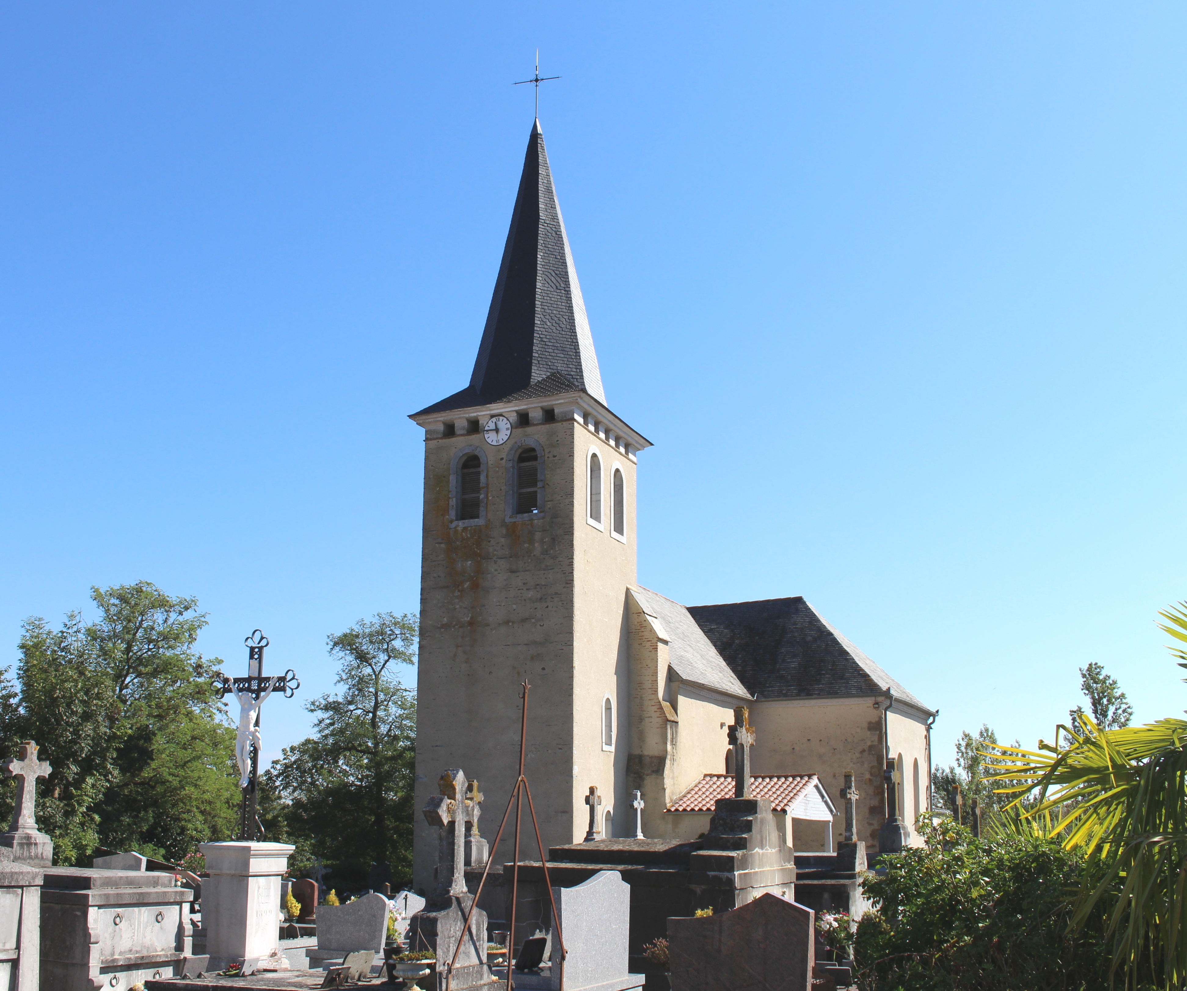 Église Saint-Pierre-et-Saint-Paul de Lacassagne (Hautes-Pyrénées)